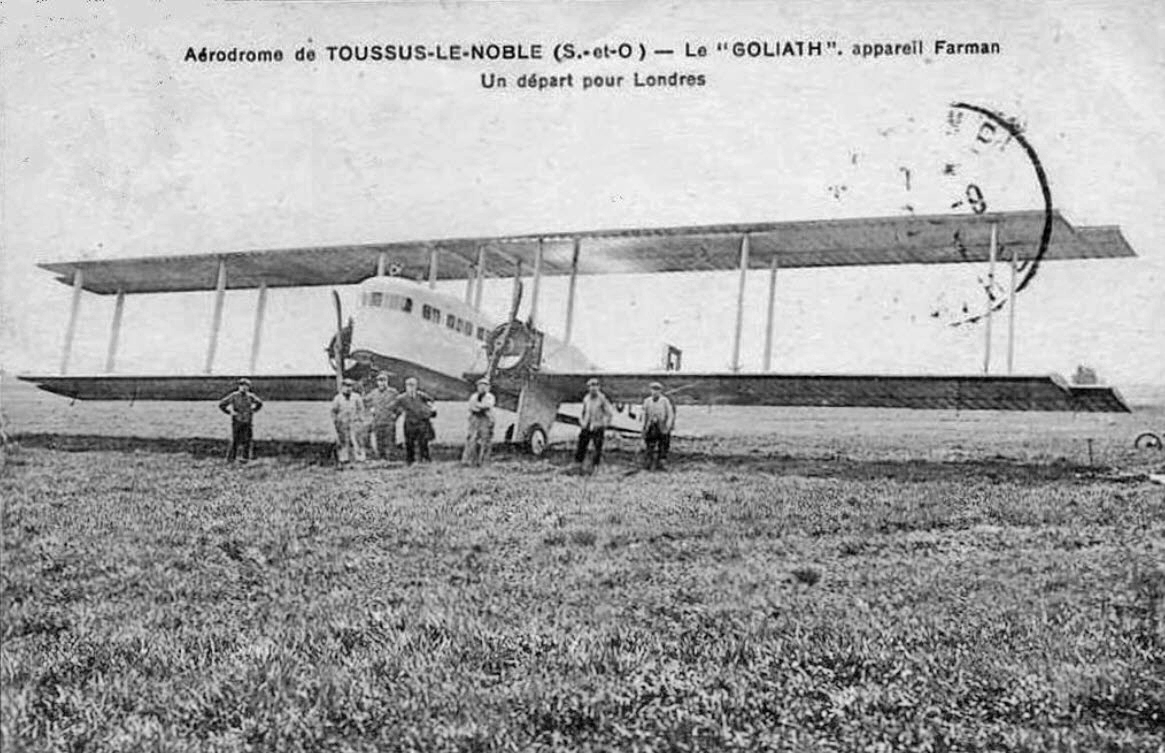 Aérodrome de TOUSSUS-LE-NOBLE (S.-et-O.) - Le "GOLIATH". appareil Farman - Un départ pour Londres